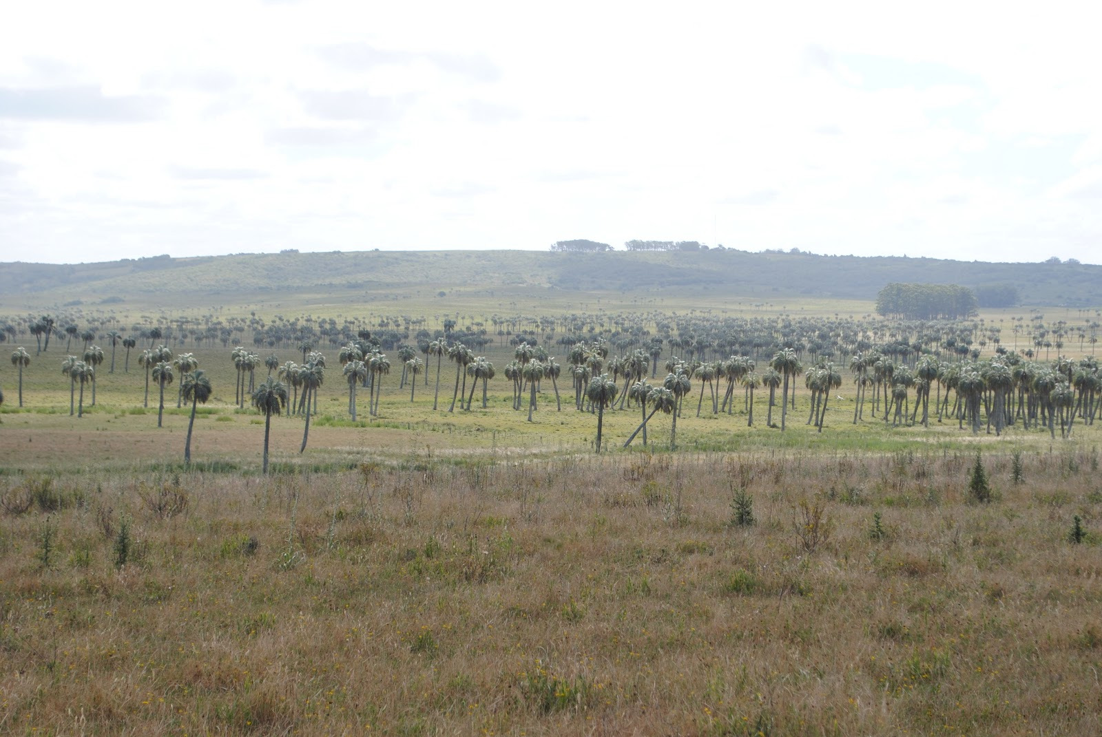 Butia capitata. Arecaceae. Fotos tomadas al margen de la Cañada del Paso del Bañado cerca a la Laguna Negra en la Ruta 16, Palmares de Castillos, departamento de Rocha, Uruguay.